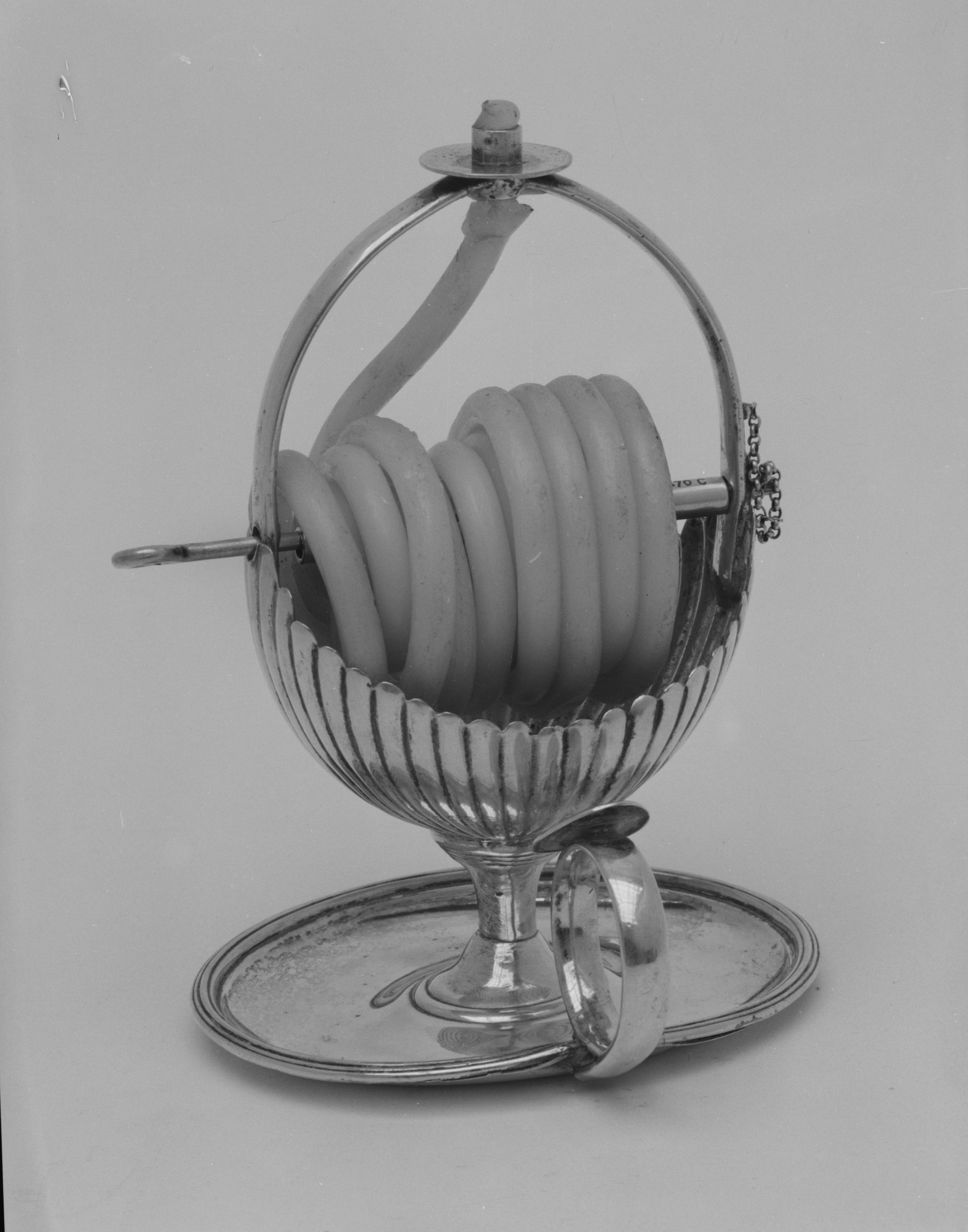 Taper winder; Metal